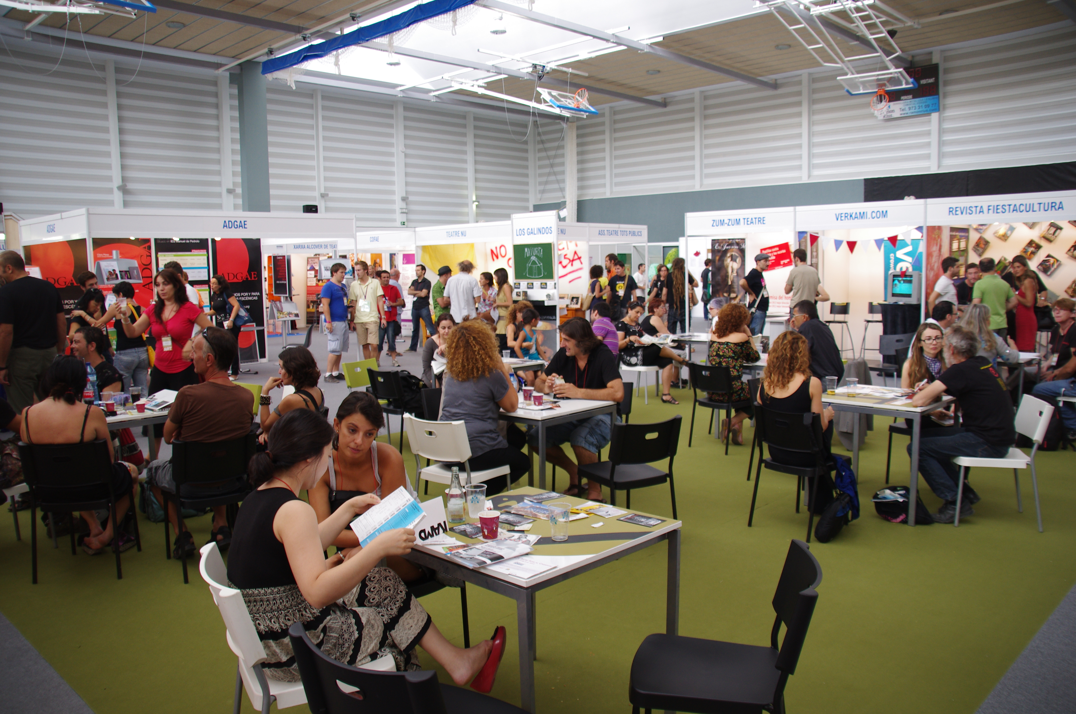 Panoràmica del pavelló firal de La Llotja a FiraTàrrega 2012